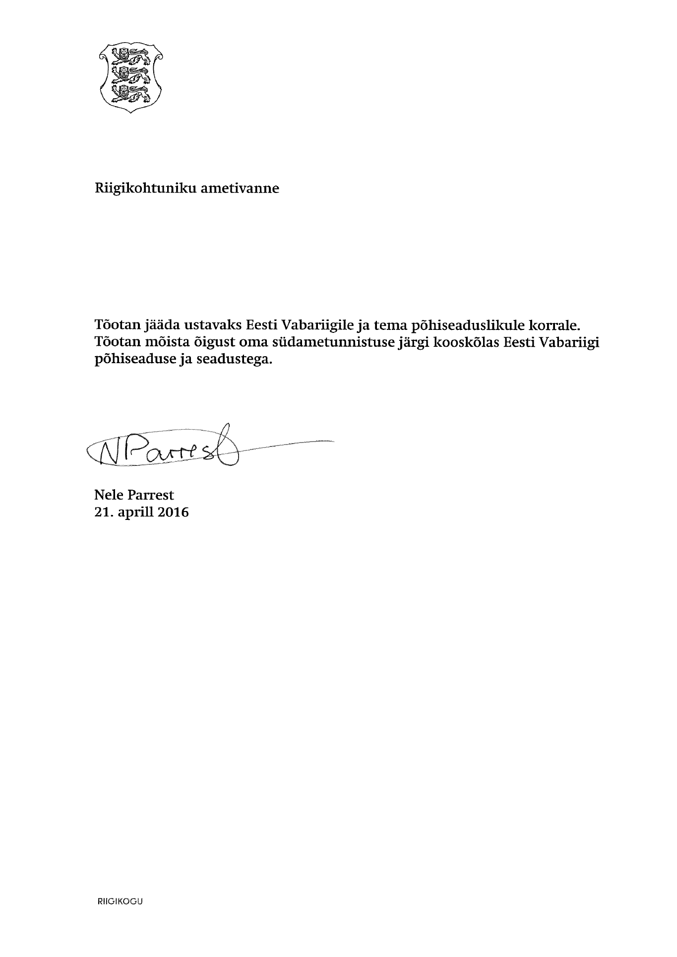 Kohtute seaduse § 56 lg 1 järgi annab kohtunik ametisse nimetamisel vande. Kohtunikuvande tekst säilitatakse kohtuniku isikutoimikus Riigikohtus. Riigikohtuniku Nele Parresti (Parrest) ametivanne, mille ta andis Riigikogu ees 21.04.2016